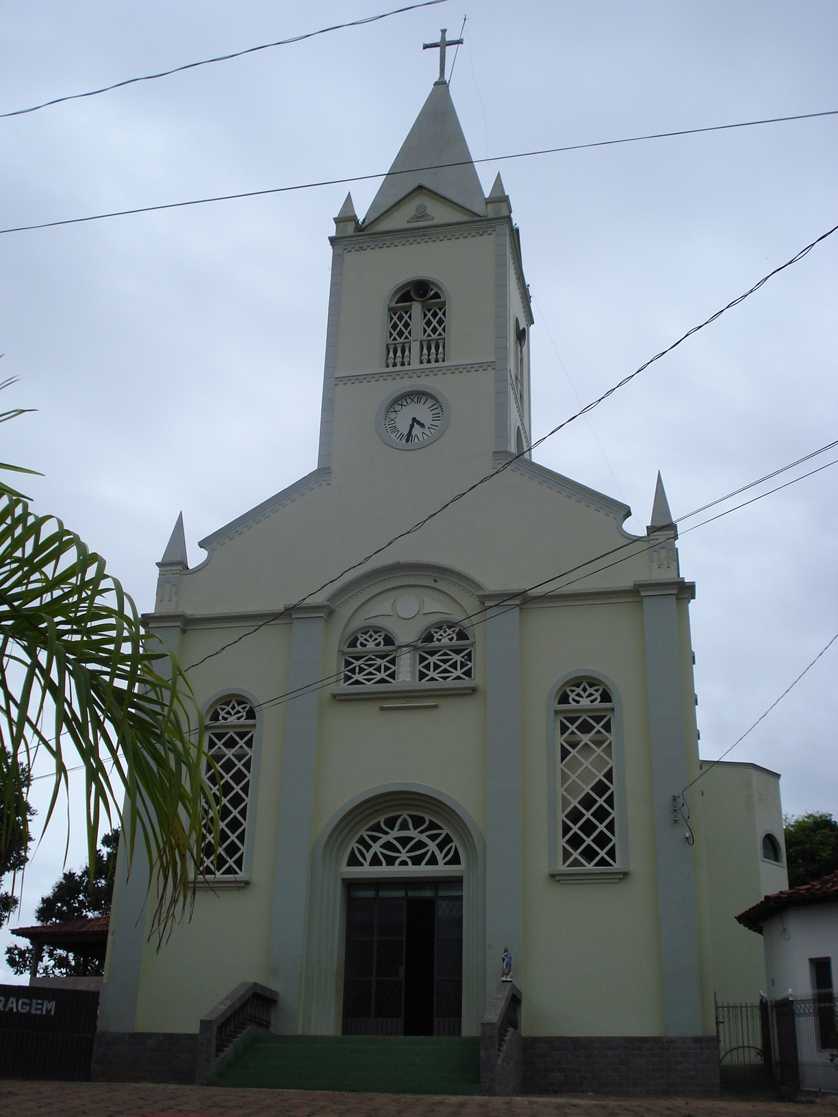 Fachada da Igreja Matriz de Nossa Senhora da Conceição, em Conceição de Ipanema, Minas Gerais, Brasil.